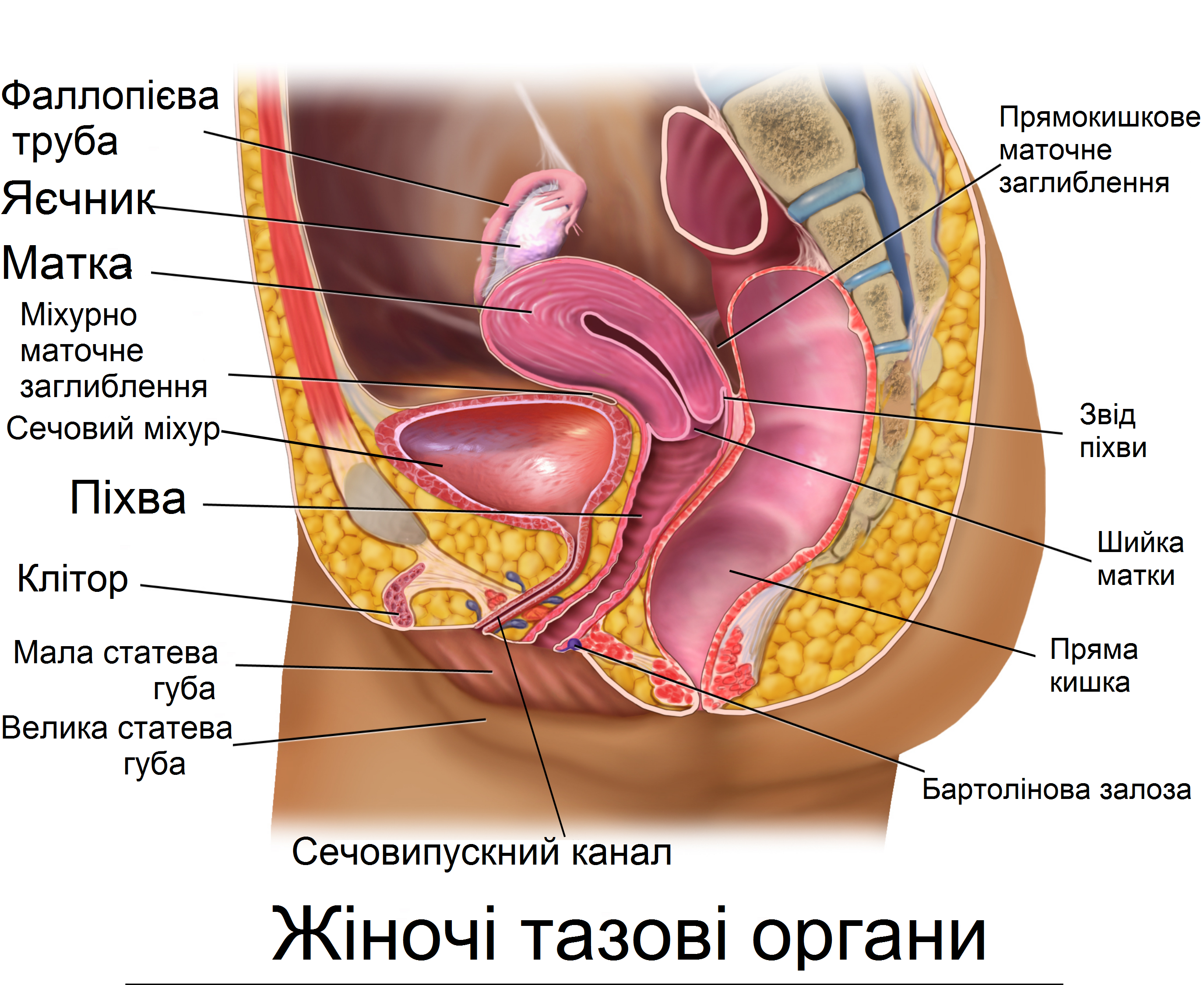 Статева система (внутрішні та зовнішні статеві органи) жінки та суміжні тазові органи (нижні відділи сечовивідної і травної систем) в поздовжньому розрізі (вид збоку).